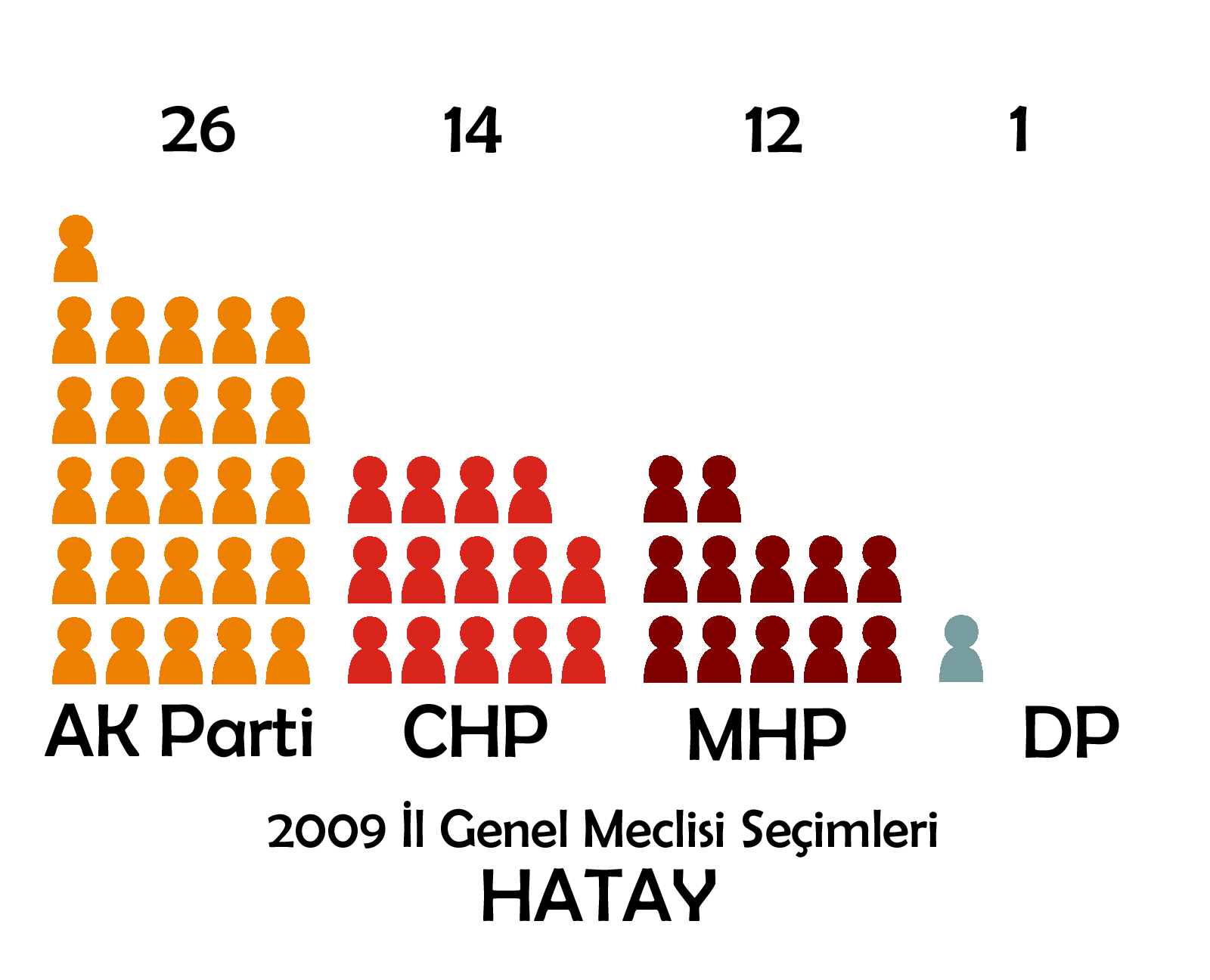 İl Genel Meclisi Seçim sonuçları